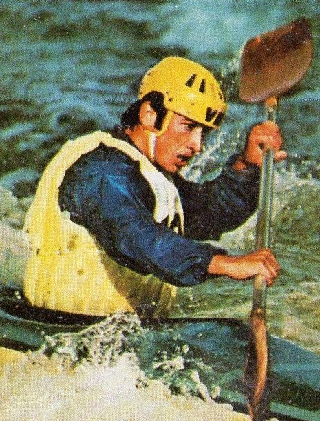 CAMPIONI dello SPORT 1973/74-Figurina n.130- HORN - GERM.EST -CANOA